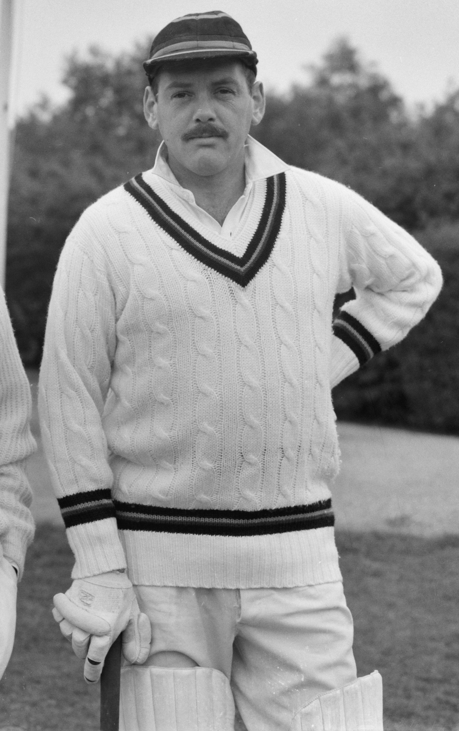 Collectie / Archief : Fotocollectie Anefo Reportage / Serie : [ onbekend ] Beschrijving : Cricketduel tussen ACC en de aanvoerders van cricketclubs G. Meyer en Wally van Weele Datum : 3 juni 1961 Trefwoorden : aanvoerders, cricket Persoonsnaam : G. Meyer Fotograaf : Bilsen, Joop van / Anefo Auteursrechthebbende : Nationaal Archief Materiaalsoort : Negatief (zwart/wit) Nummer archiefinventaris : bekijk toegang 2.24.01.04 Bestanddeelnummer : 912-5497